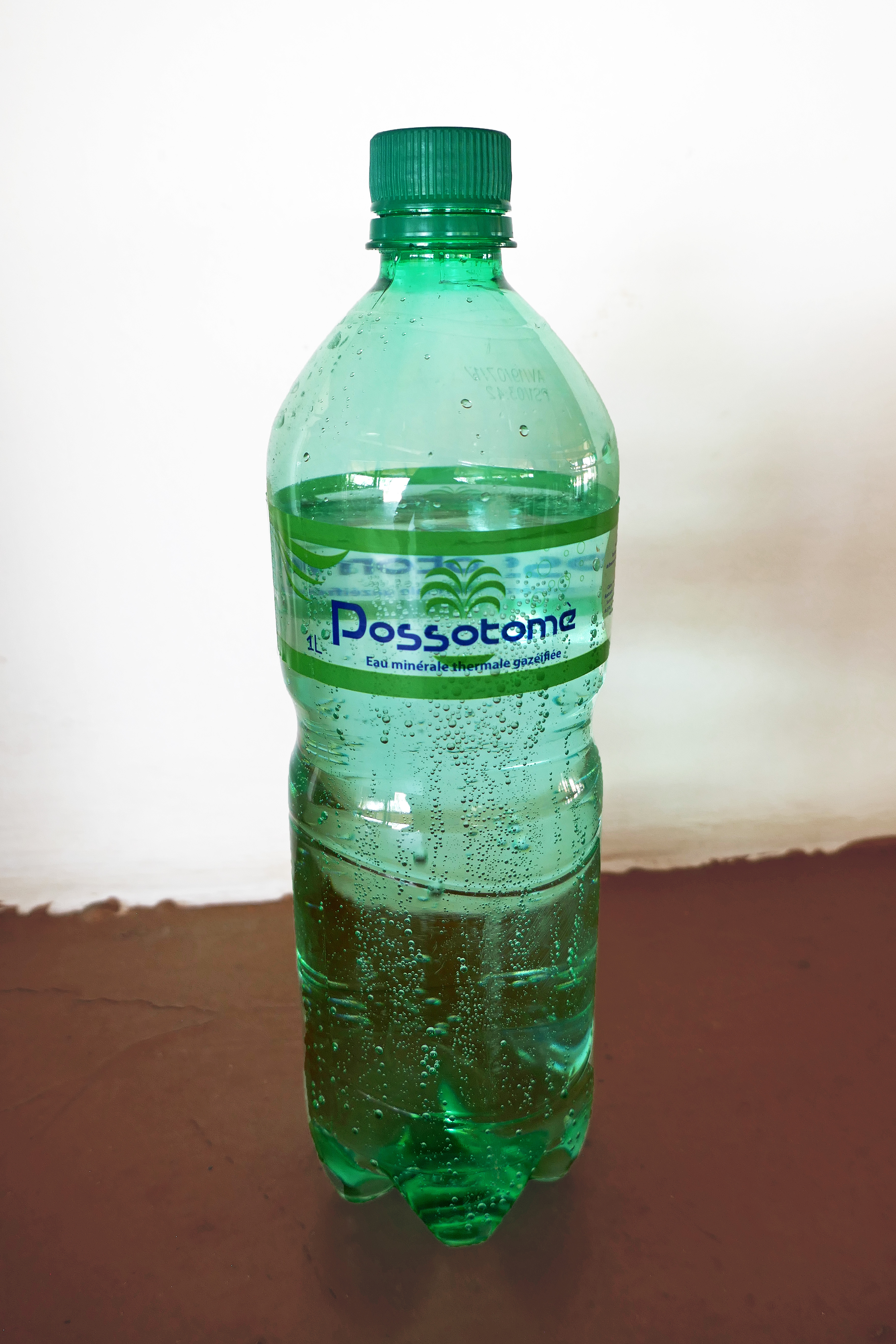 Bouteille d'eau minérale gazéifiée de Possotomé (Bénin).